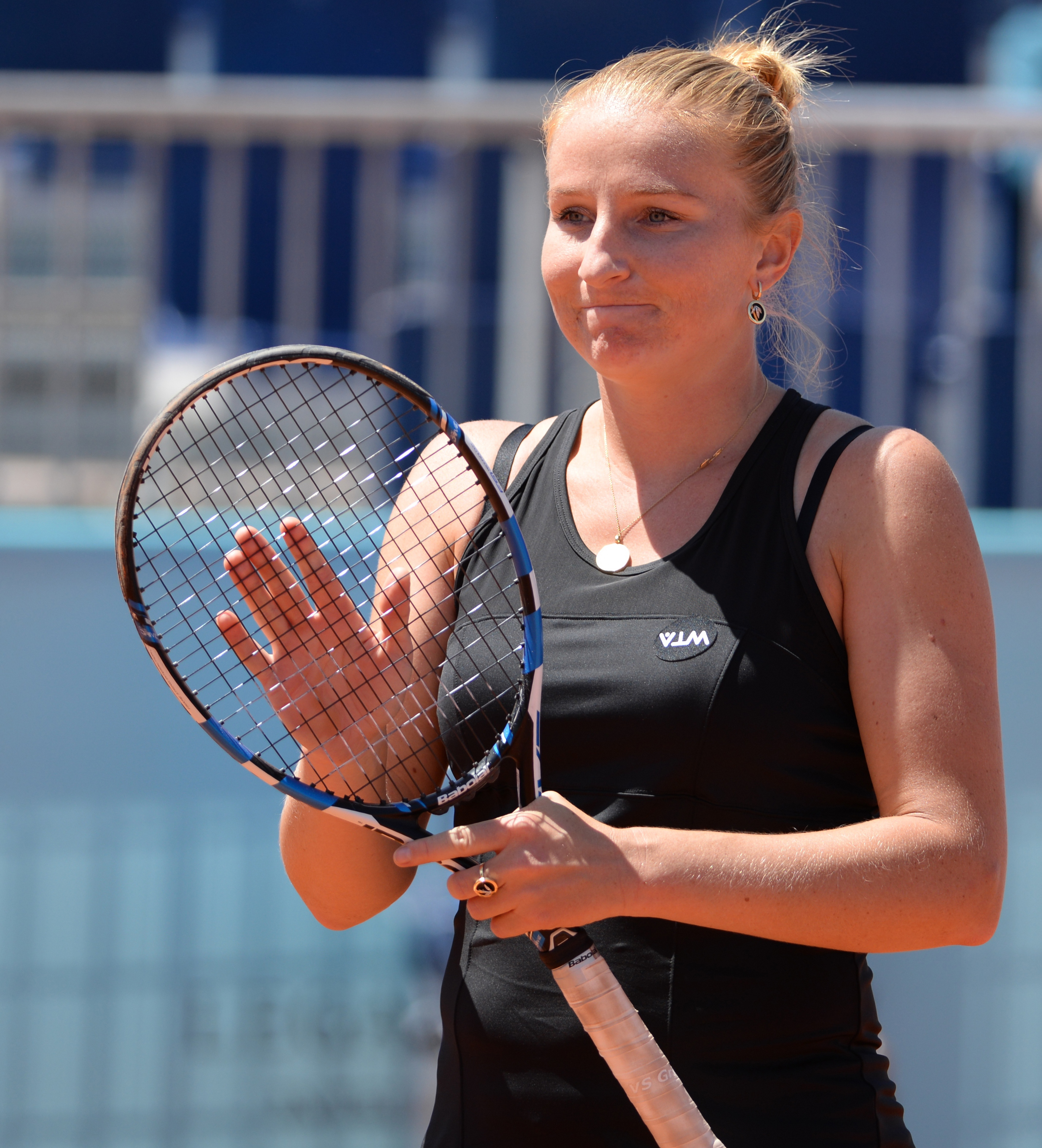 Alla Kudryavtseva